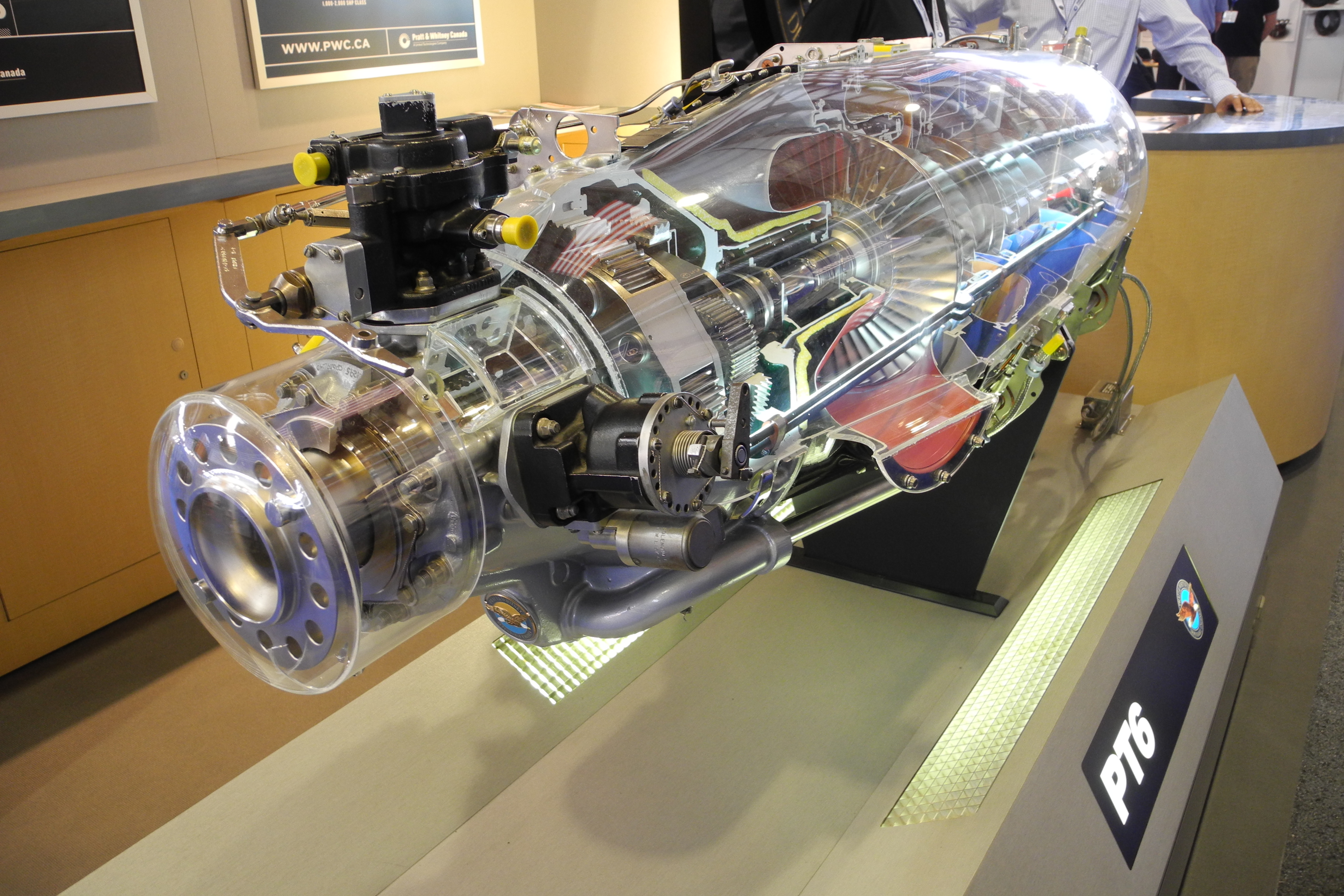 Aero Friedrichshafen 2012